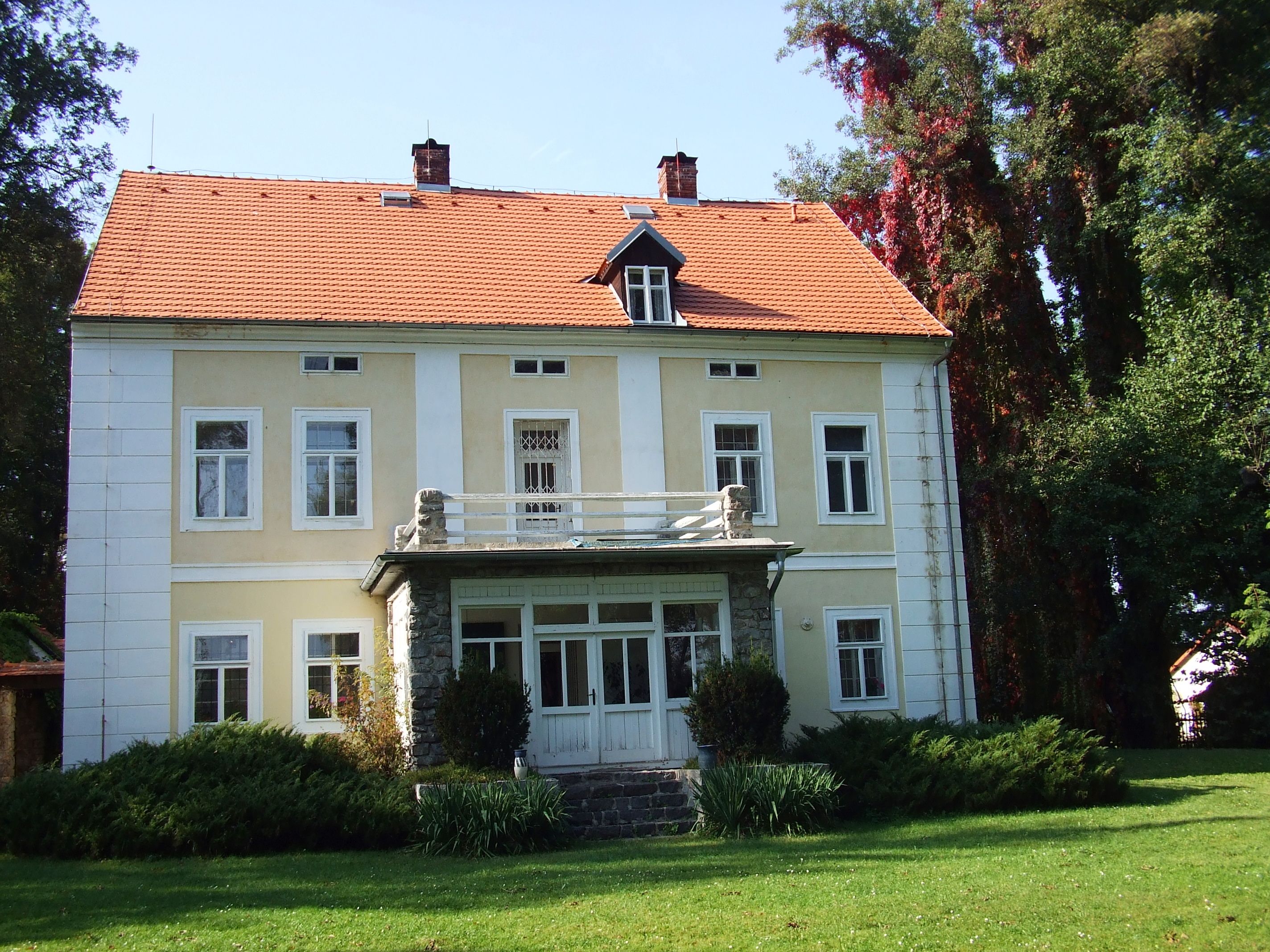 památník-Čapkova vila - zezadu